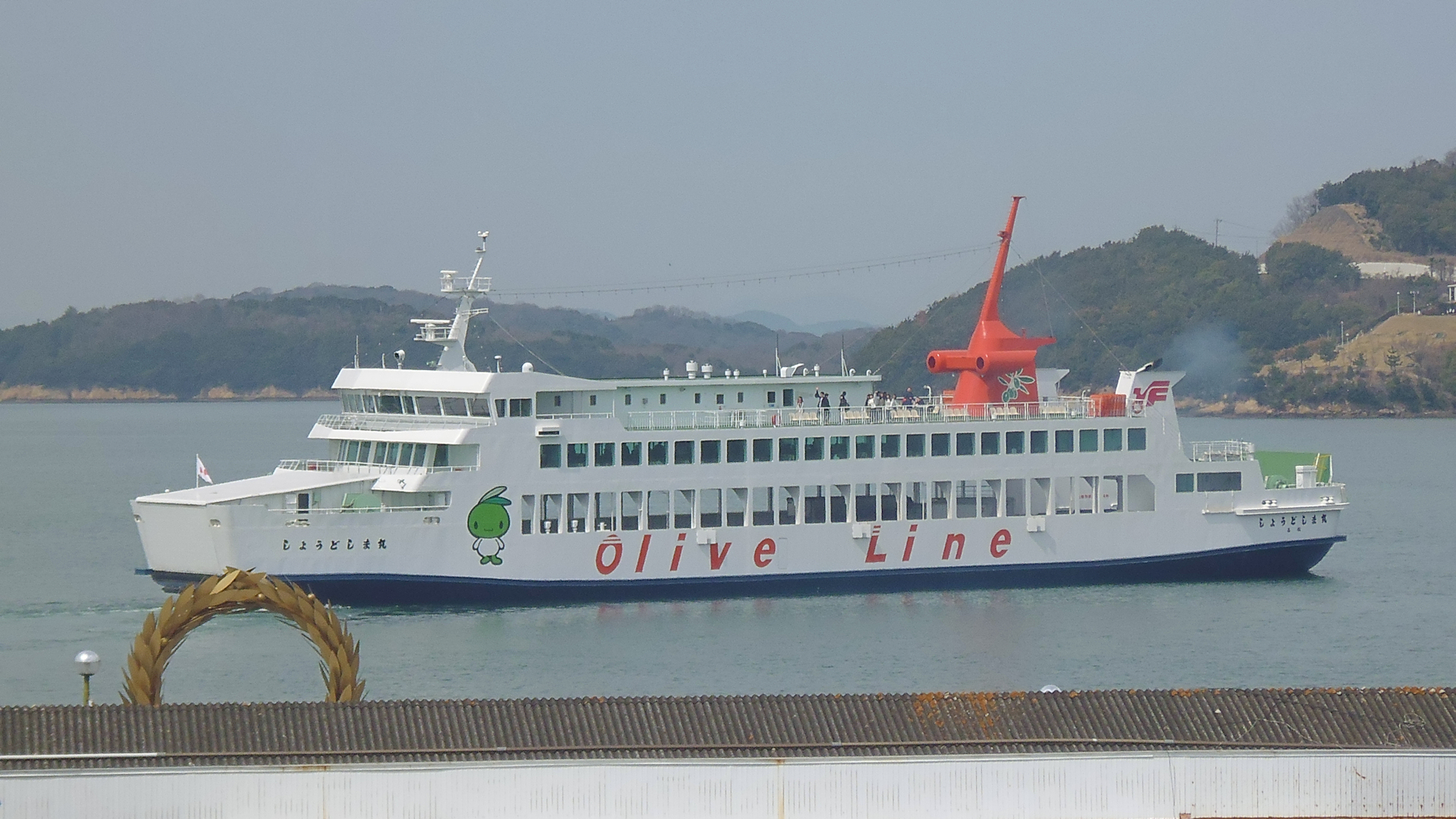 土庄港にて撮影